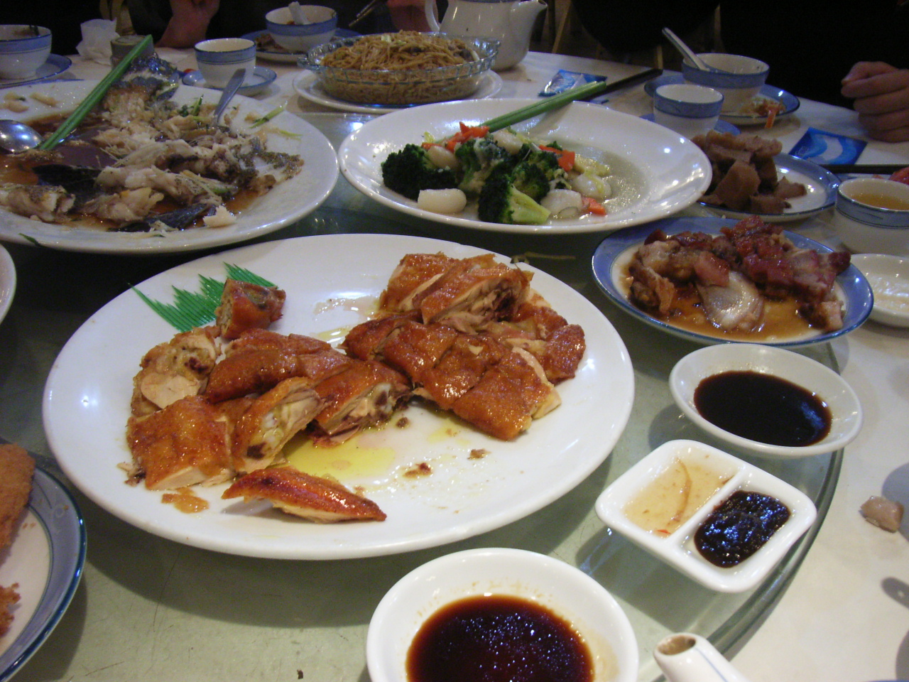 炸子雞是zh:中國zh:廣東、香港和zh:澳門地區的zh:酒樓常見小菜，皮薄香脆的脆皮炸雞為最佳。 在家中少有自製，原因是製作工序繁複，很考工夫的。 Photo created by User:LONGS